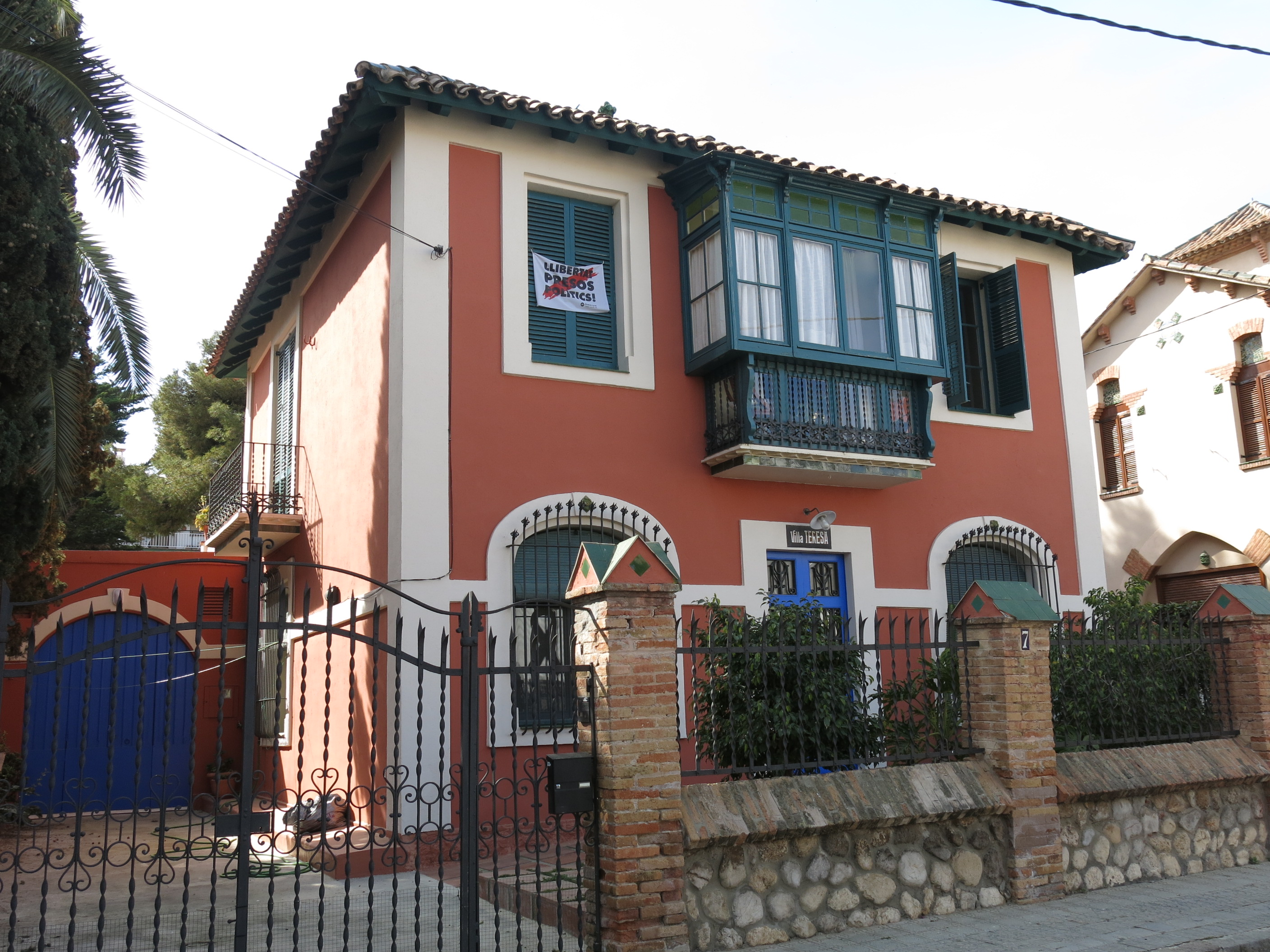 Vil·la Teresa, c. Marcel·lina Jacas 7 (Vilanova i la Geltrú), ciutat jardí de Ribes Roges